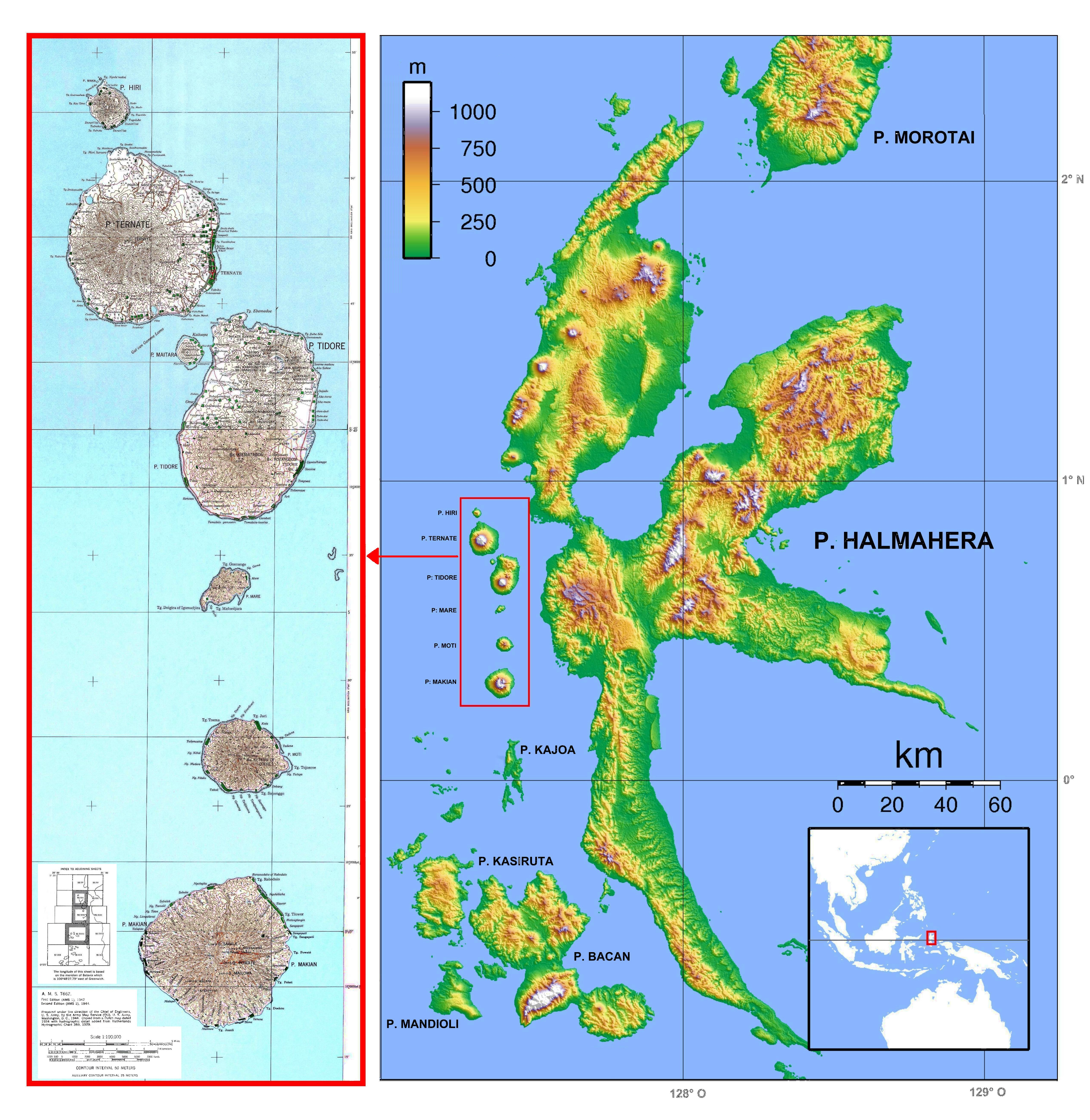 Die Inselkette Ternate bis Makian vor der Westküste von Halmahera in den nördlichen Molukken